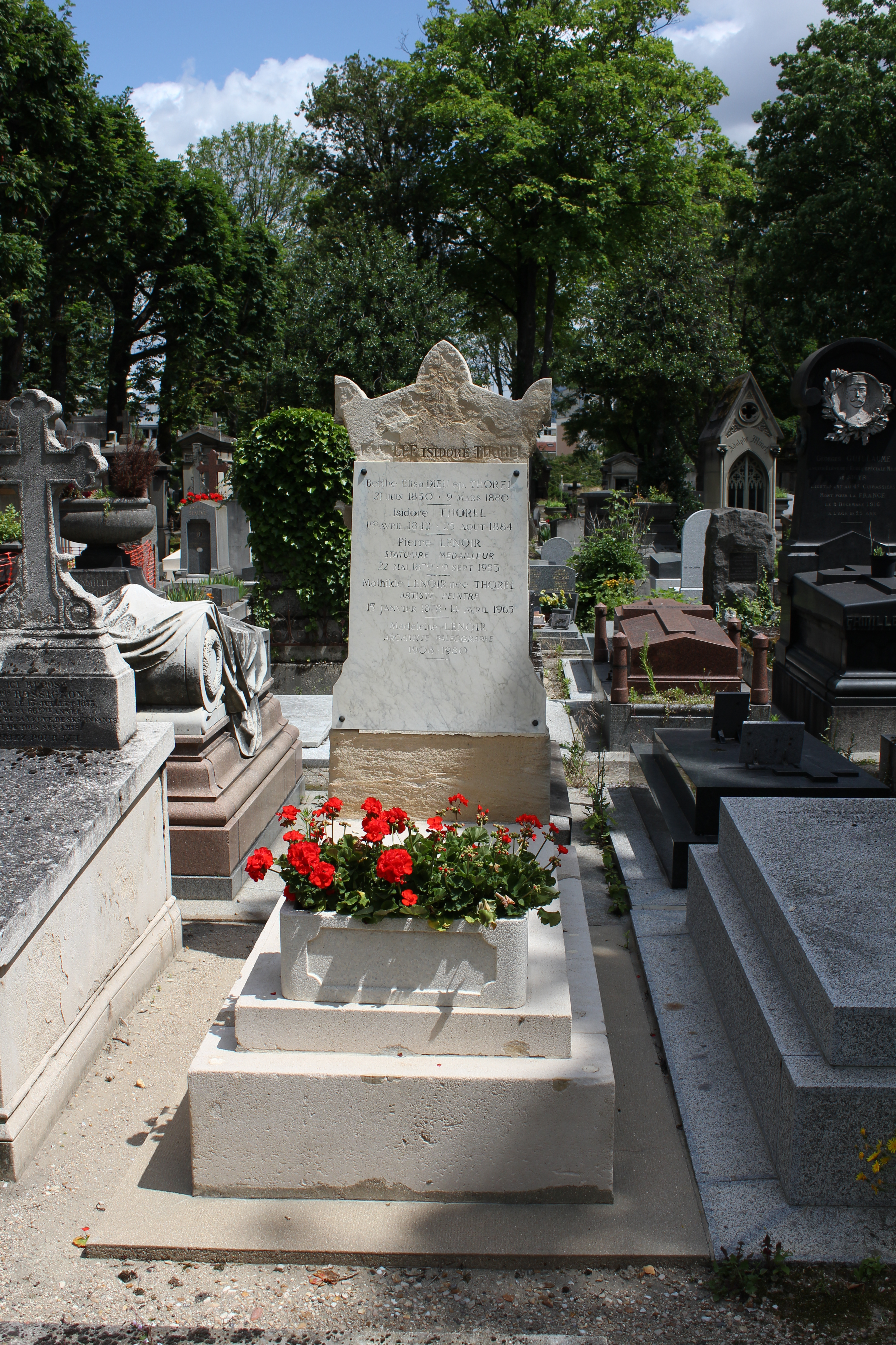 Sépulture de Pierre Lenoir (1879-1953), statuaire ; Mathilde Lenoir (1878-1965), peintre ; Madeleine Lenoir (1906-1980), archiviste paléographe.